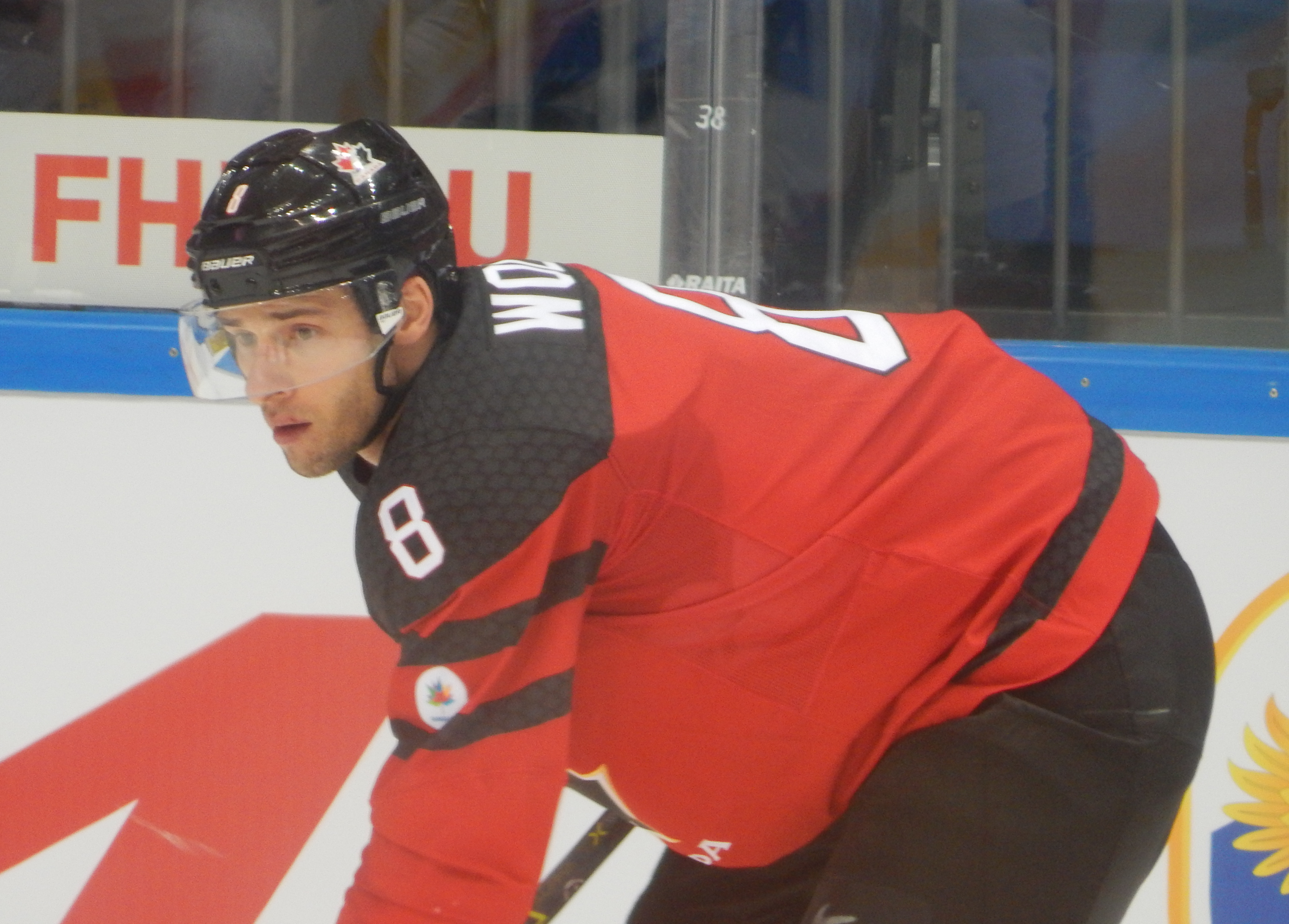 Кубок Первого Канала 2017, матч Канада - Южная Корея (13 декабря 2017) 8 WOLSKI,Wojtek (CAN)